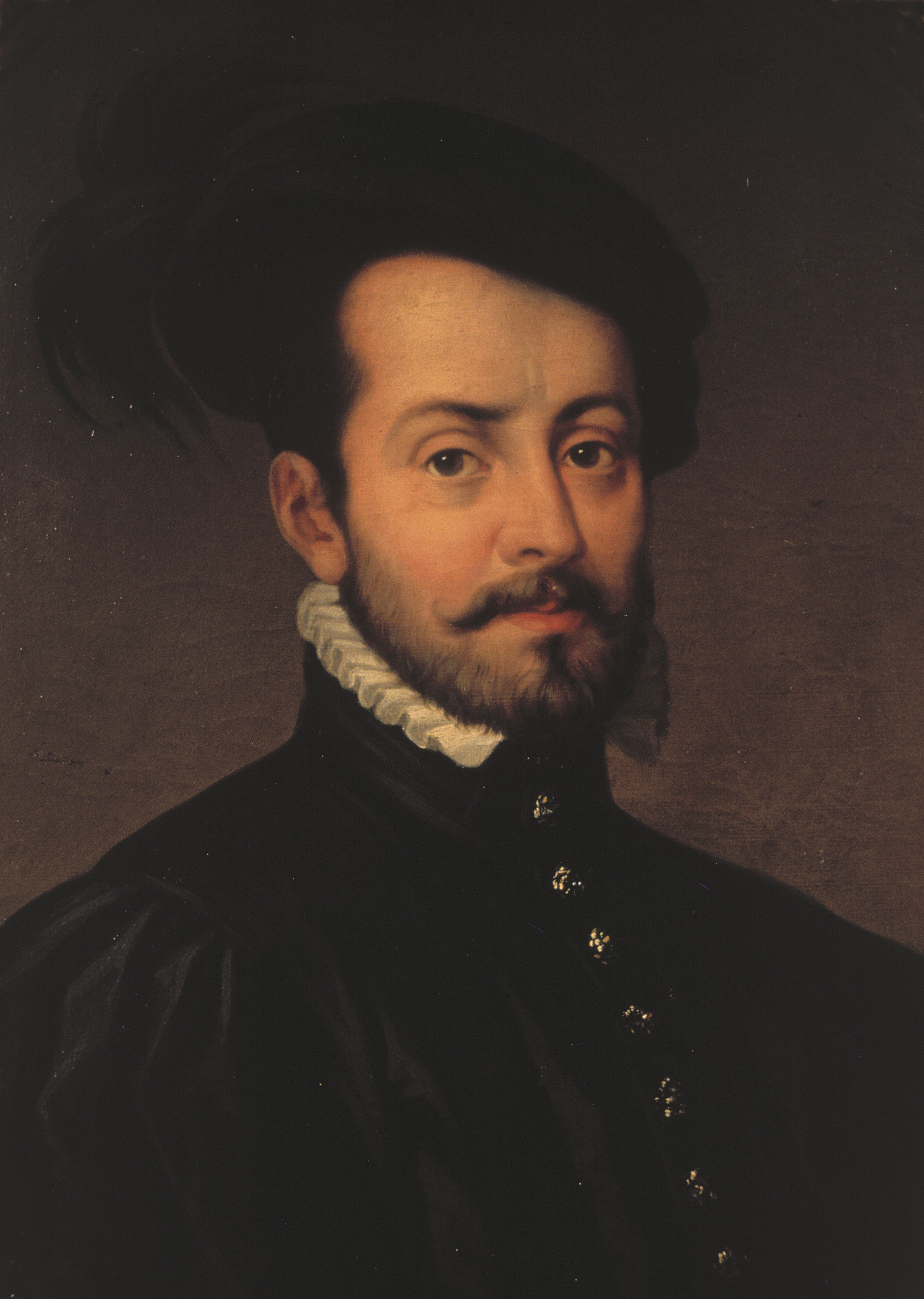 Retrato del conquiatador Hernán Cortés de Monroy